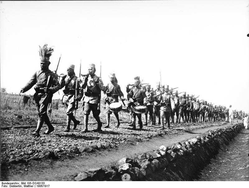 Die Trommel ruft ...